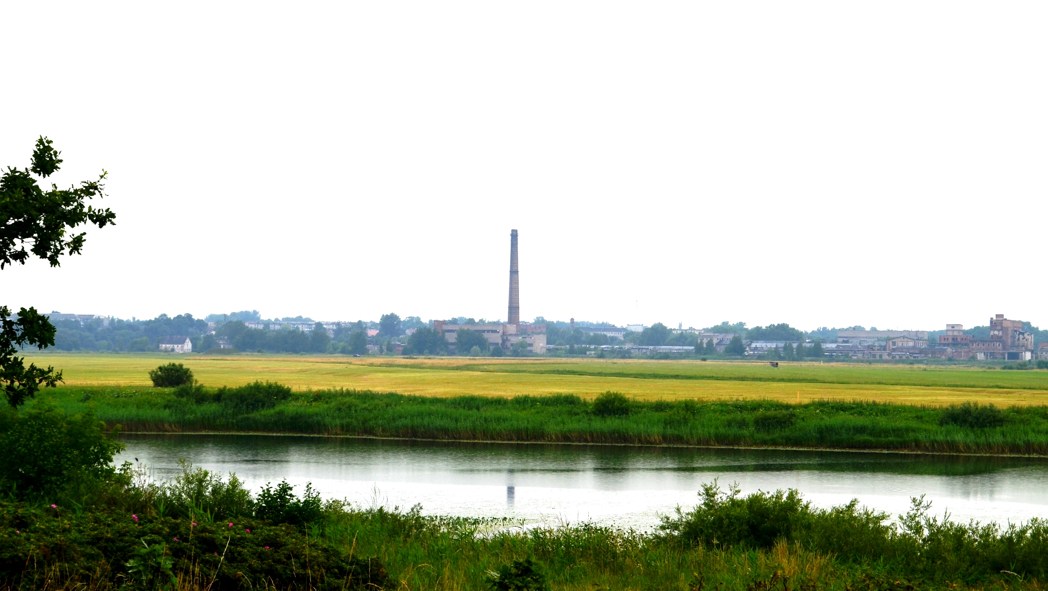 Ragainė (Nemanas) žvelgiant nuo bokšto prie Merguvos ežero